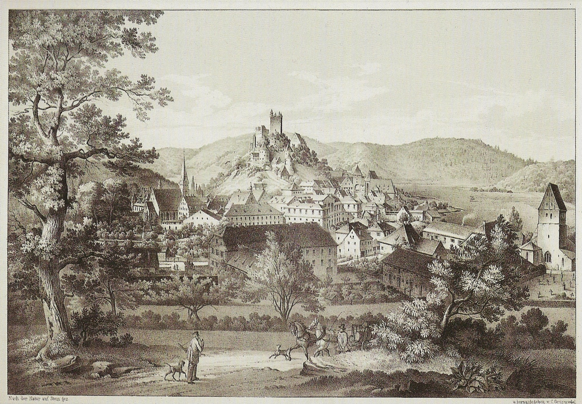 Ansicht von Burg und Stadt Pappenheim vom Weinberg aus. (Lithographie von C. Grünwedel, 1835)